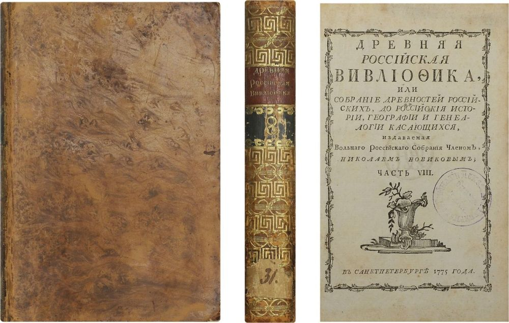 Часть VIII "Древней российской вивлиофики"